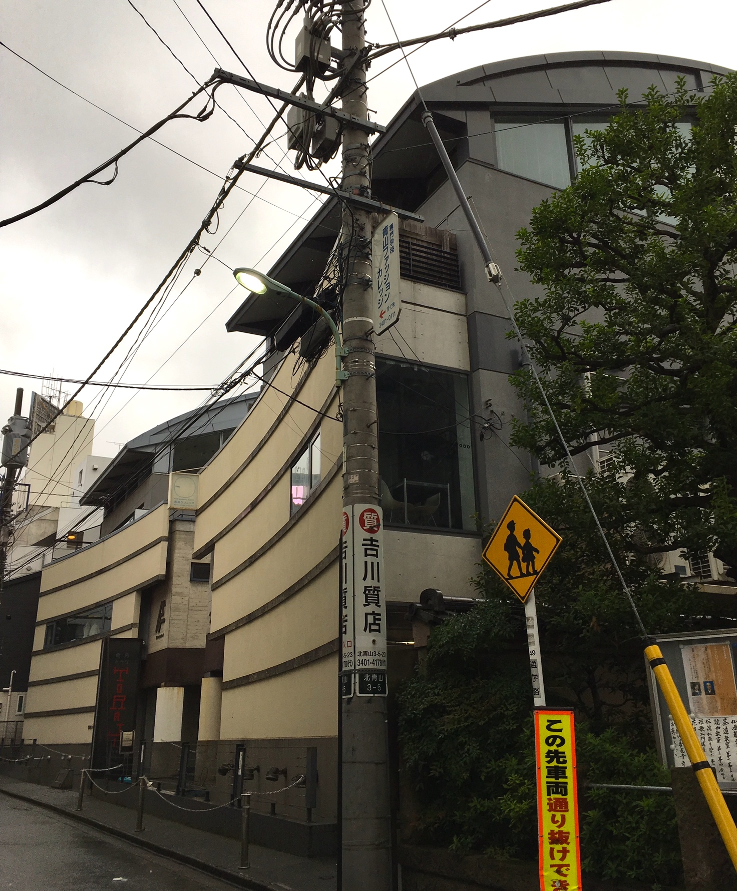 團紀彦の作品